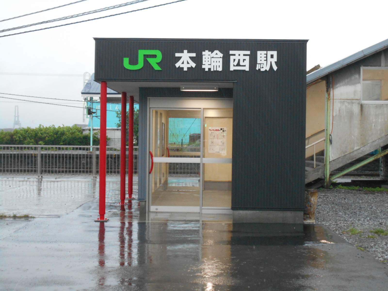 JR室蘭本線 本輪西駅